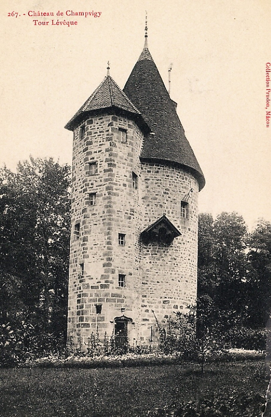 La Tour Lévêque du château de Champvigy de Saint-Bonnet-de-Vieille-Vigne Saône-et-Loire